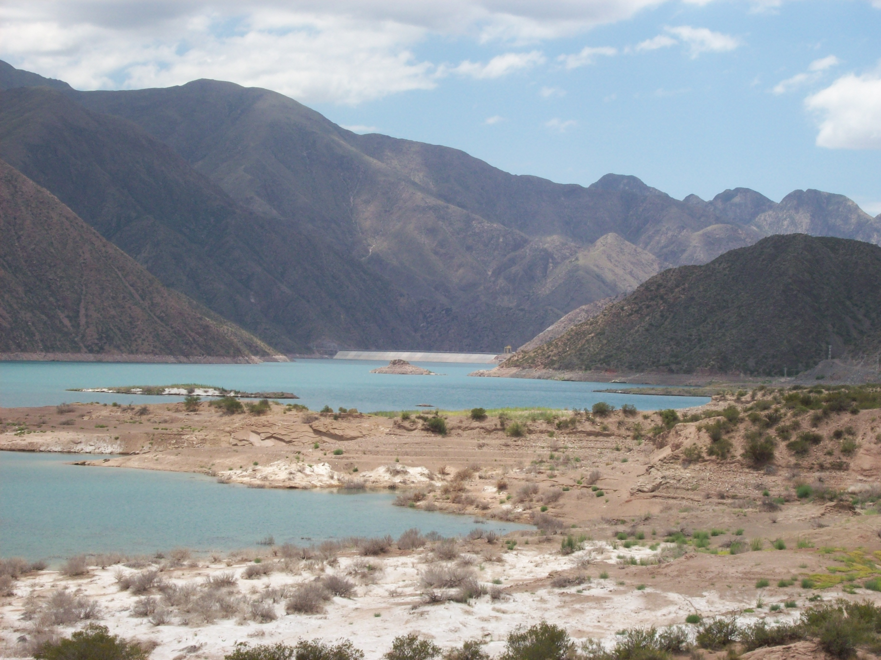 Embalse Potrerillos sobre el Río Mendoza y dique, ubicado en el límite entre los departamentos de Luján de Cuyo (sur, donde estaba la cámara) y Las Heras (norte), Provincia de Mendoza, Argentina.